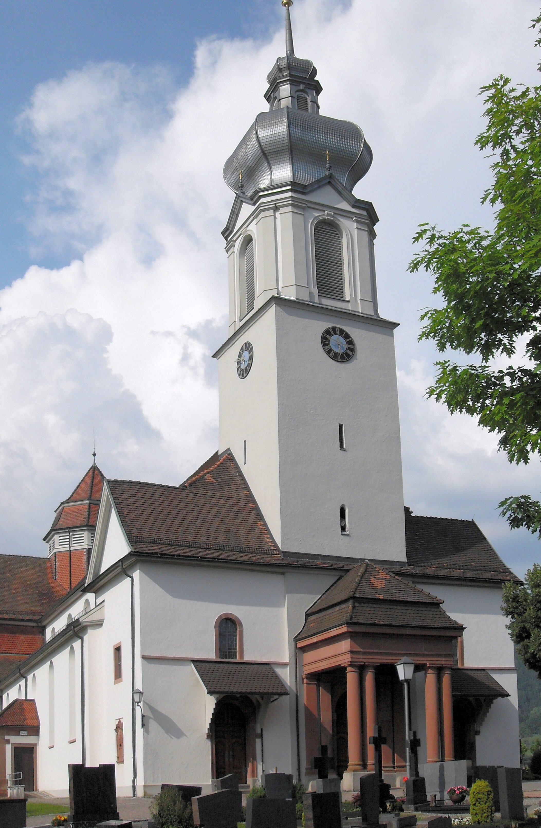 Kirche St. Martin in Wehr